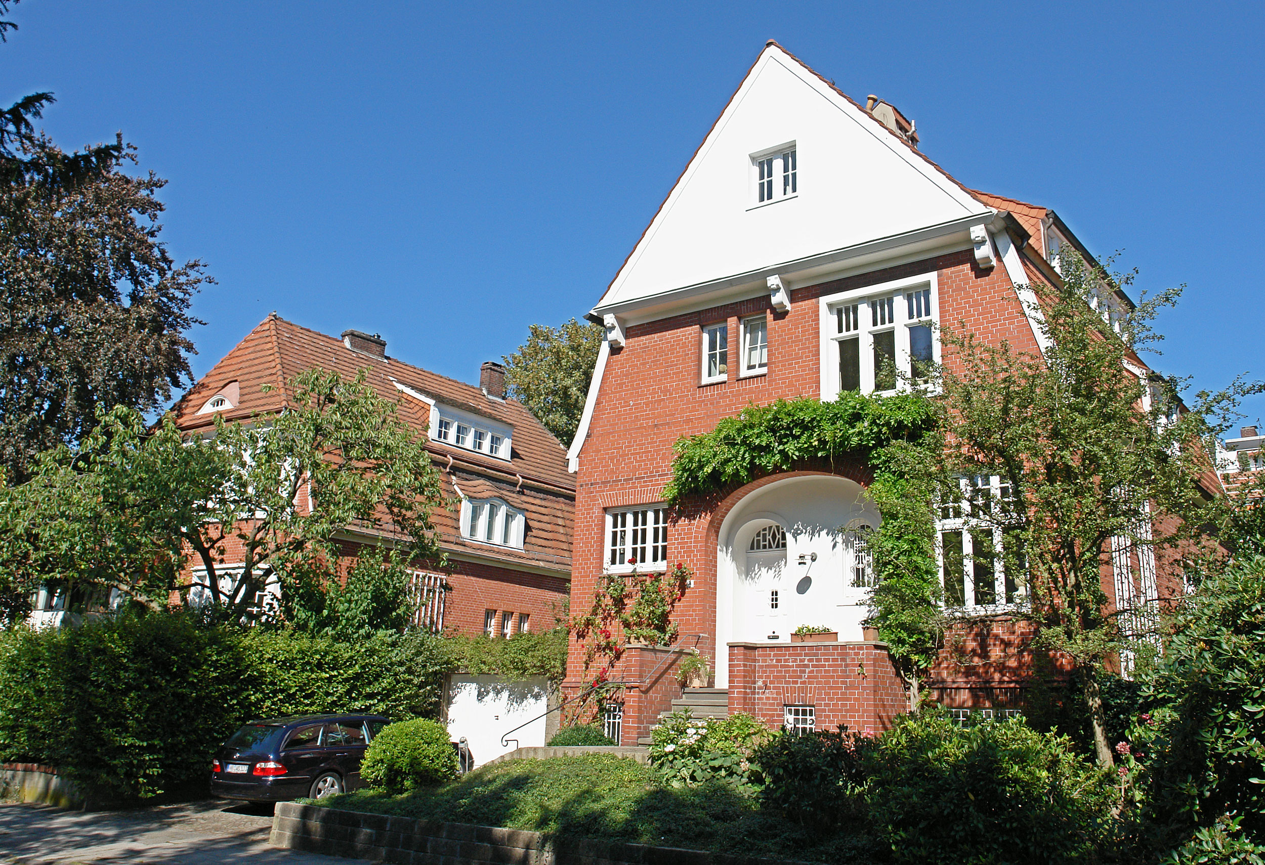 Wohnhausgruppe in Bremen, Richard-Dehmel-Straße 2+4Die Denkmalgruppe ist ein geschütztes Kulturdenkmal in der Freien Hansestadt Bremen, mit der Nr. 1159 beim Landesamt für Denkmalpflege registriert.